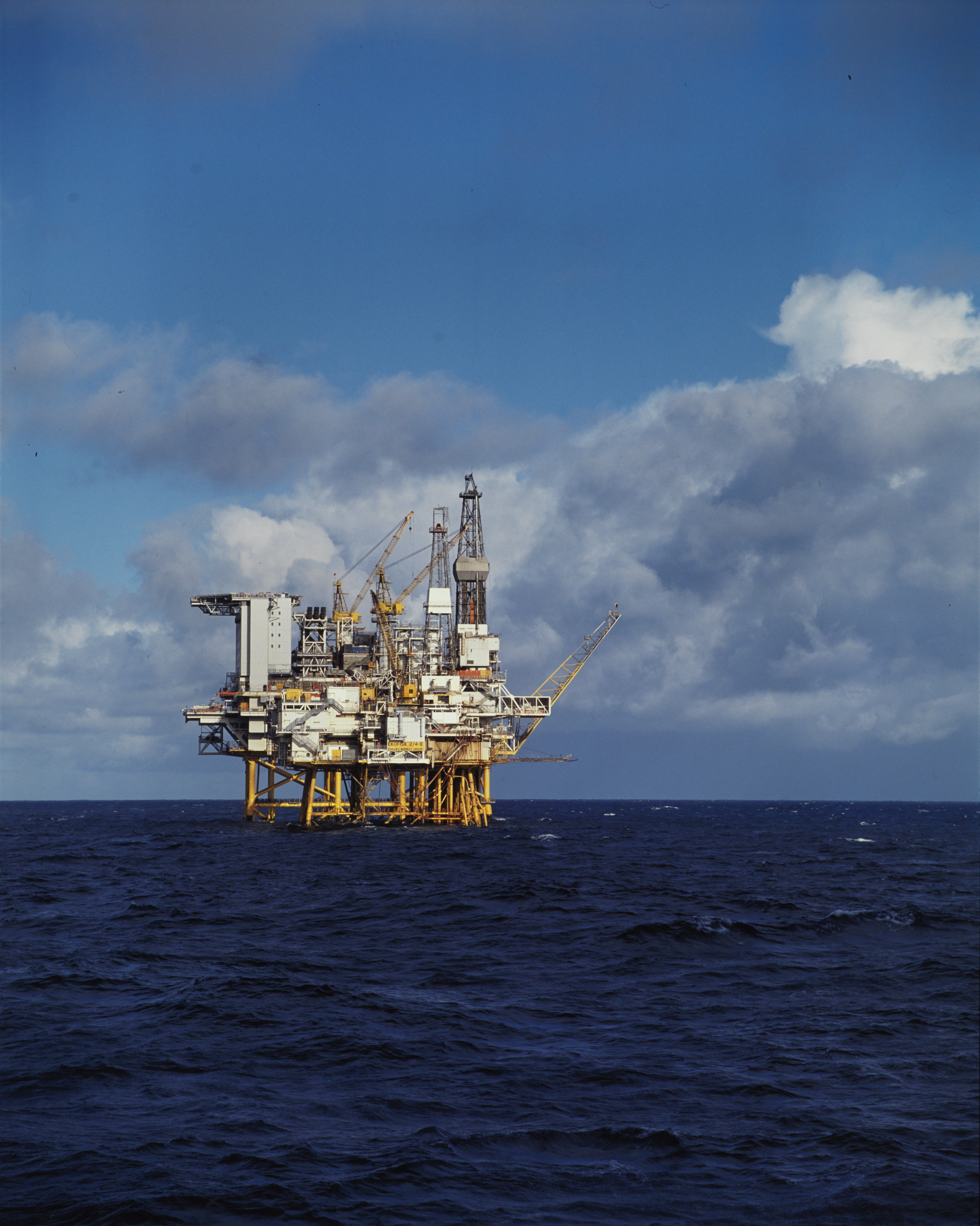 Foto av oljeplattformene Ekofisk 2/4 B (foran) og 2/4 K. Ekofisk-feltet - operatør Phillips. Blokk 2/4 Nordsjøen